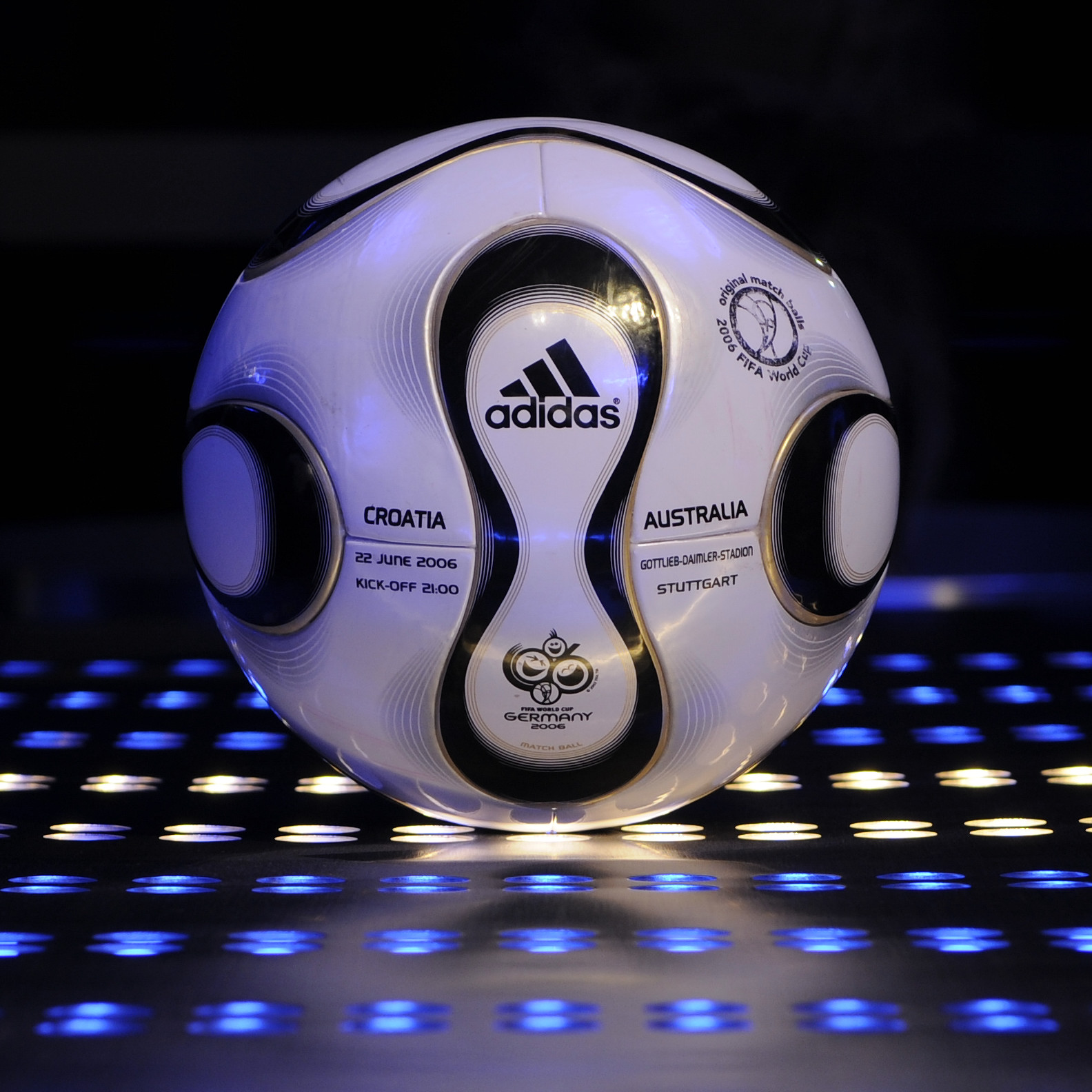 Teamgeist-Spielball Match No.44 Kroatien gegen Australien vom 22.6.2006 in Stuttgart